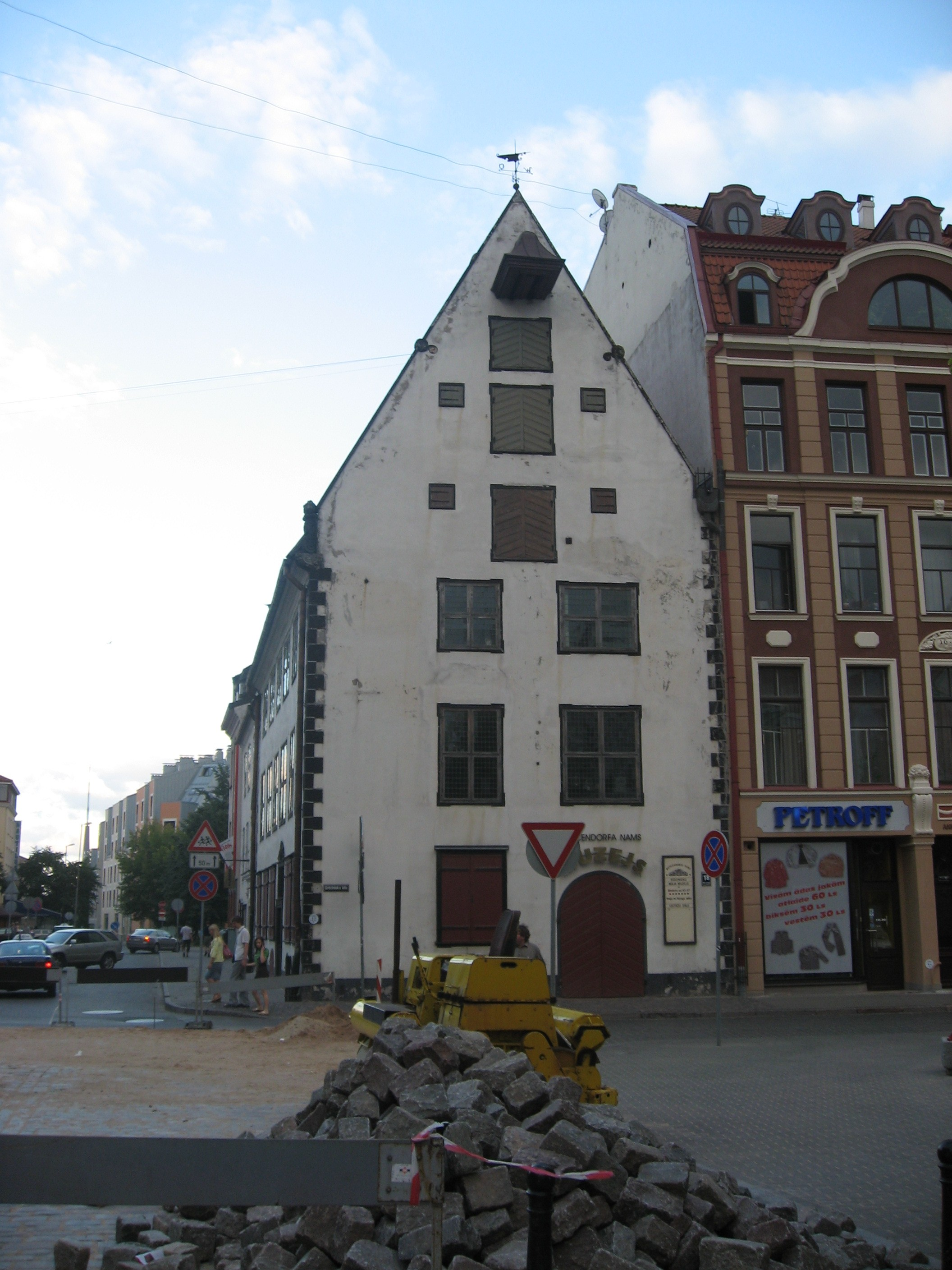 Dům v centru Rigy